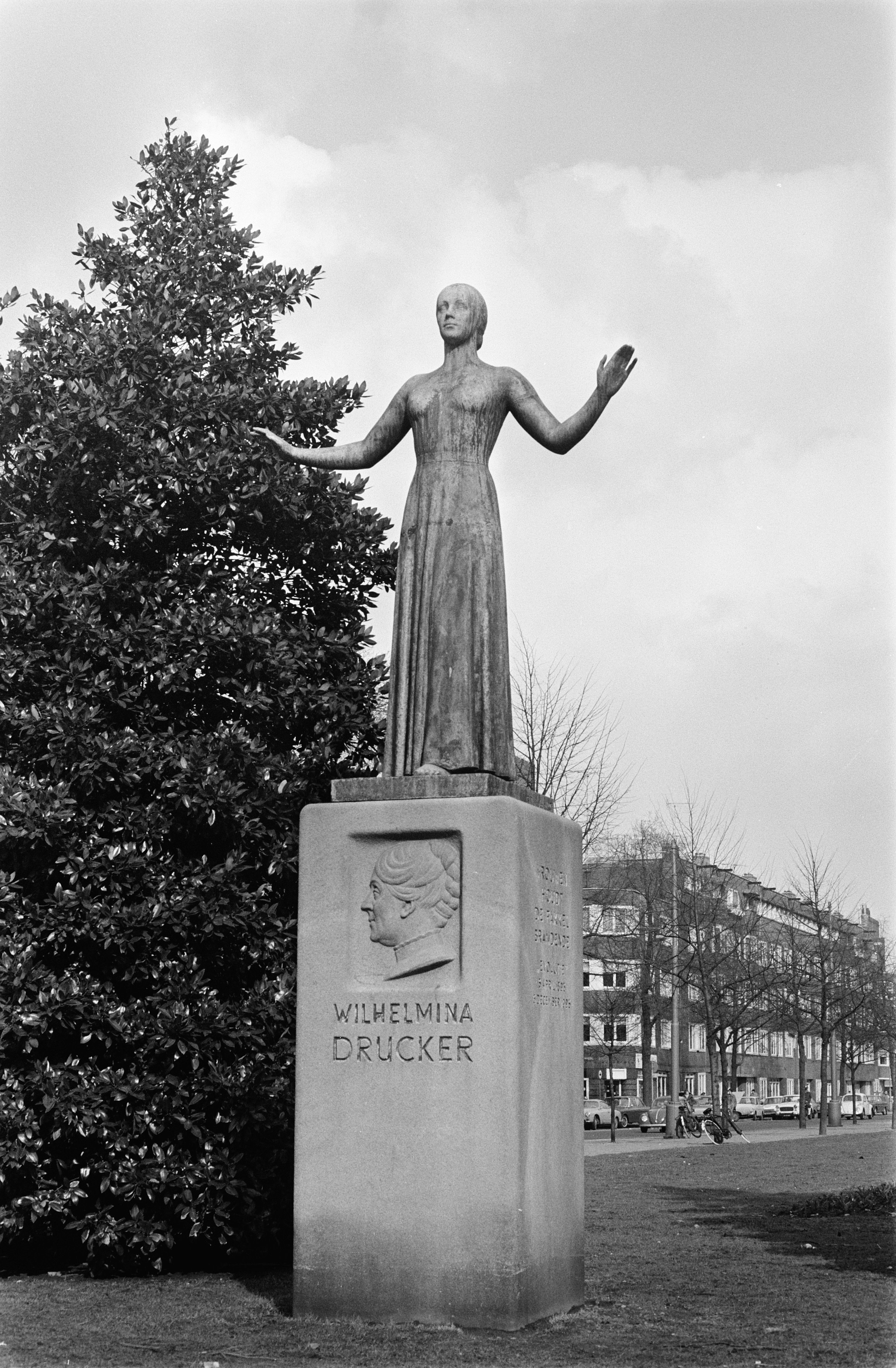 Collectie / Archief : Fotocollectie Anefo Reportage / Serie : [ onbekend ] Beschrijving : Opdracht Volkskrant. Beeld van Wilhelmina Drucker in Amsterdam Datum : 7 april 1970 Locatie : Amsterdam, Noord-Holland Trefwoorden : beelden Instellingsnaam : Volkskrant Fotograaf : Verhoeff, Bert / Anefo Auteursrechthebbende : Nationaal Archief Materiaalsoort : Negatief (zwart/wit) Nummer archiefinventaris : bekijk toegang 2.24.01.05 Bestanddeelnummer : 923-4136